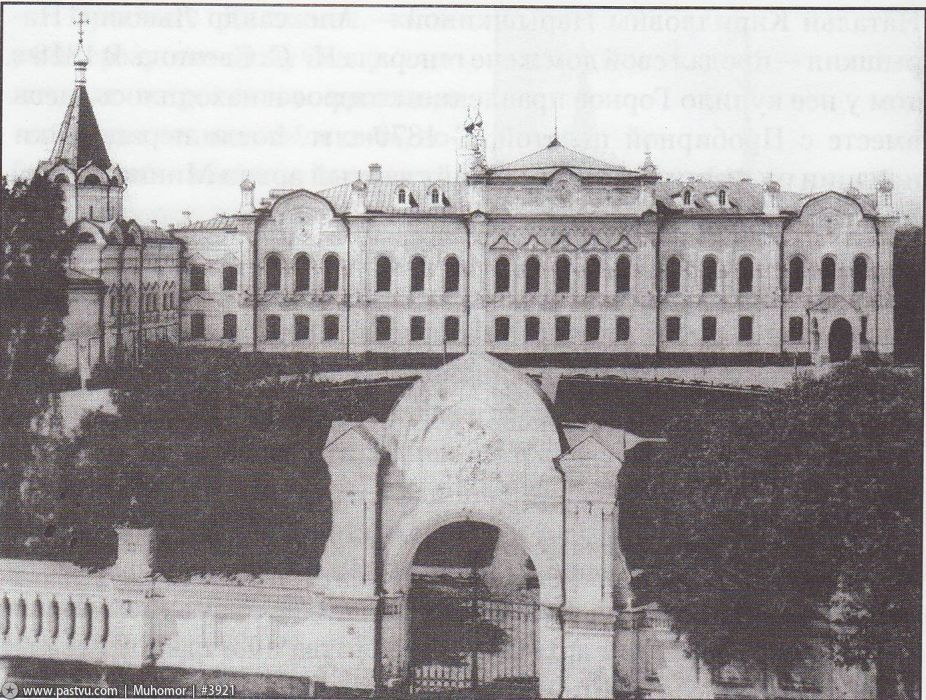 Московский главный архив на углу Воздвиженки и Моховой. Бывшие палаты Нарышкиных. В советское время на этом месте построена "Ленинка".